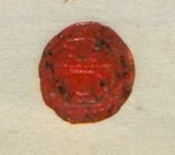 Norfuk / Pitkern: Segl for sogneprest i Kviteseid Amund Morland, i prestenes manntall 1664-1666